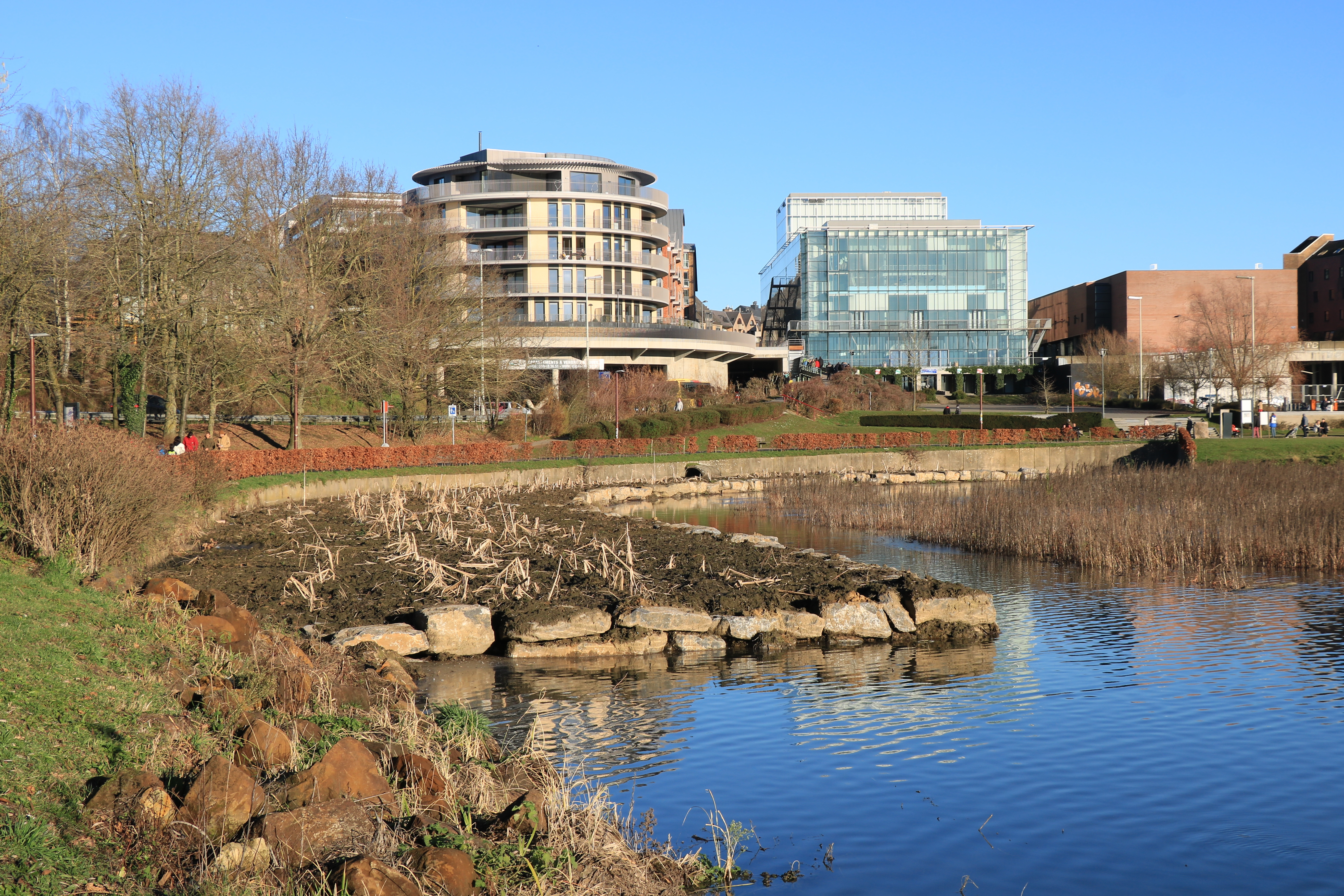 Belgique - Brabant wallon - Ottignies-Louvain-la-Neuve - Lac de Louvain-la-Neuve (lac artificiel aménagé en 1984) : zone remise en état lors de l'assec 2019